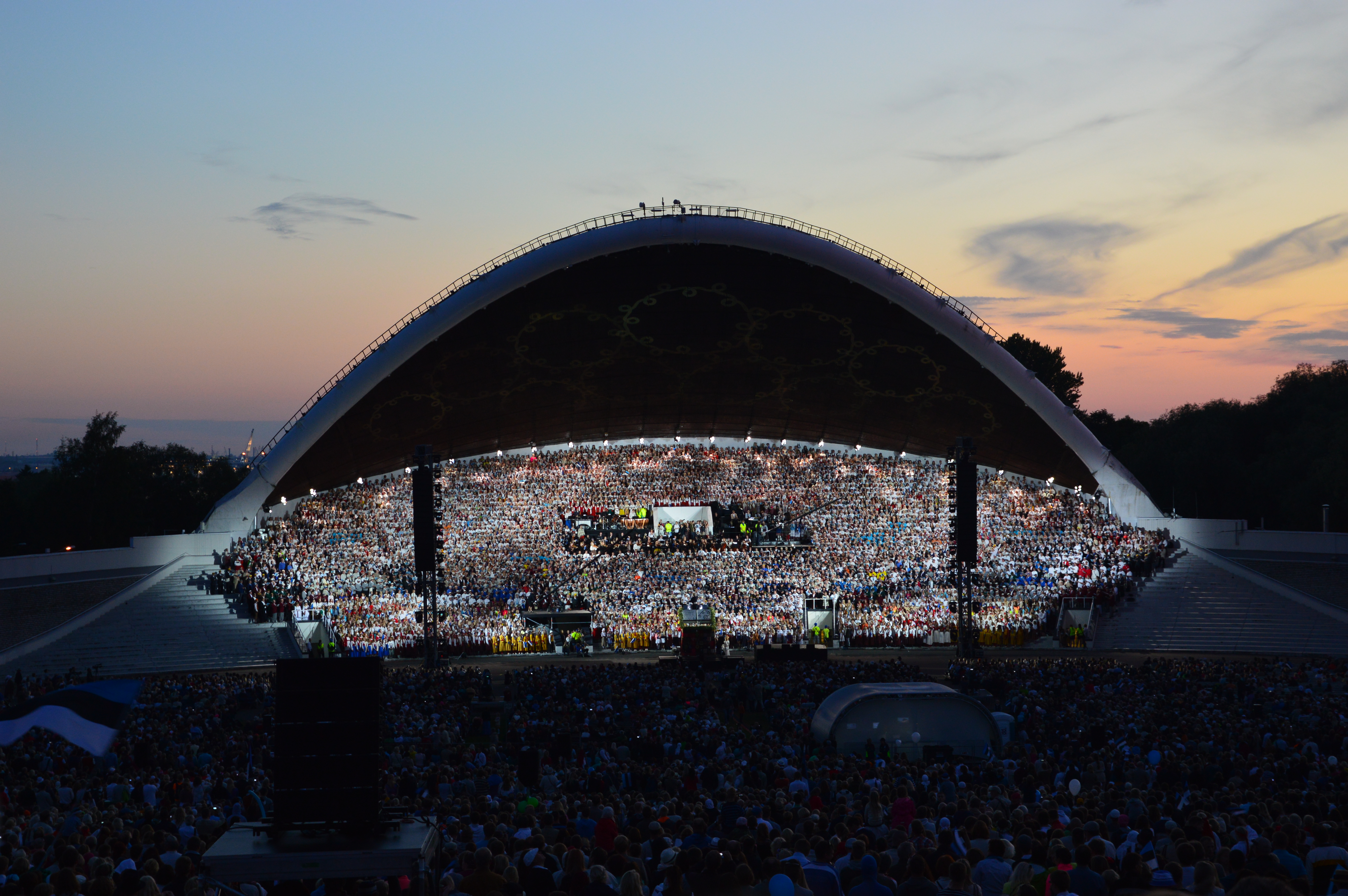 XXVI üldlaulupidu